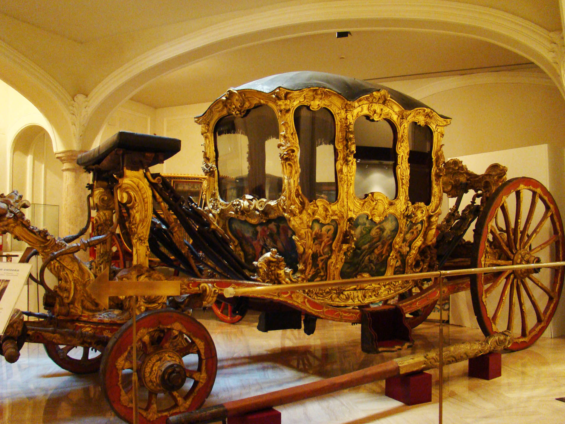 Carroza en el Museo de Cerámica de Valencia.